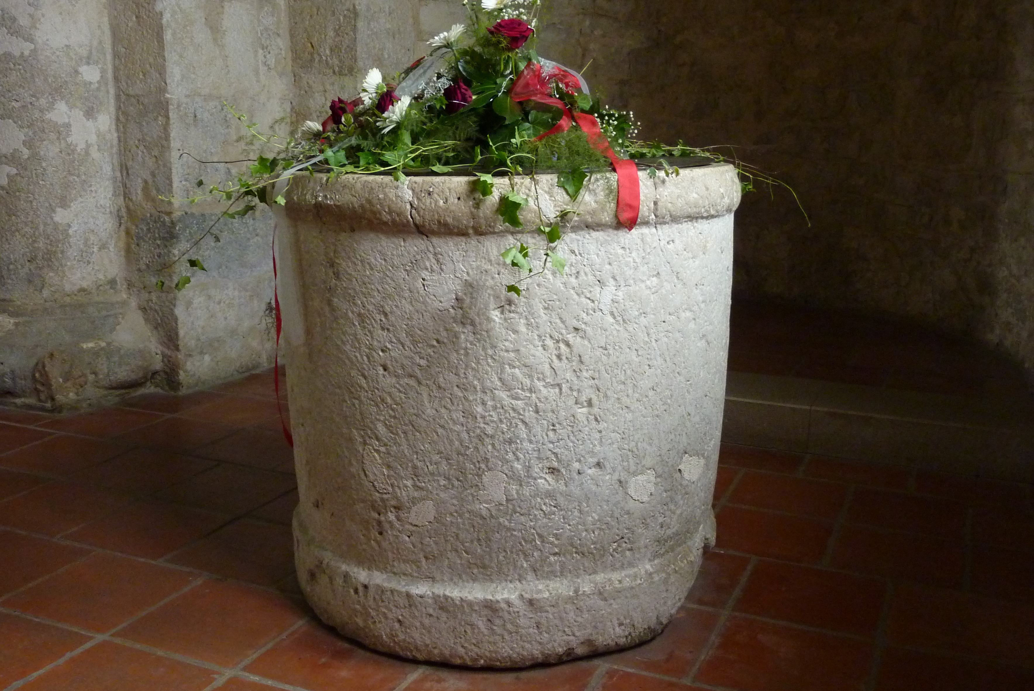 Evangelische Kirche St. Gallus in Brenz an der Brenz, einem Ortsteil von Sontheim an der Brenz (Baden-Württemberg), romanischer Taufstein